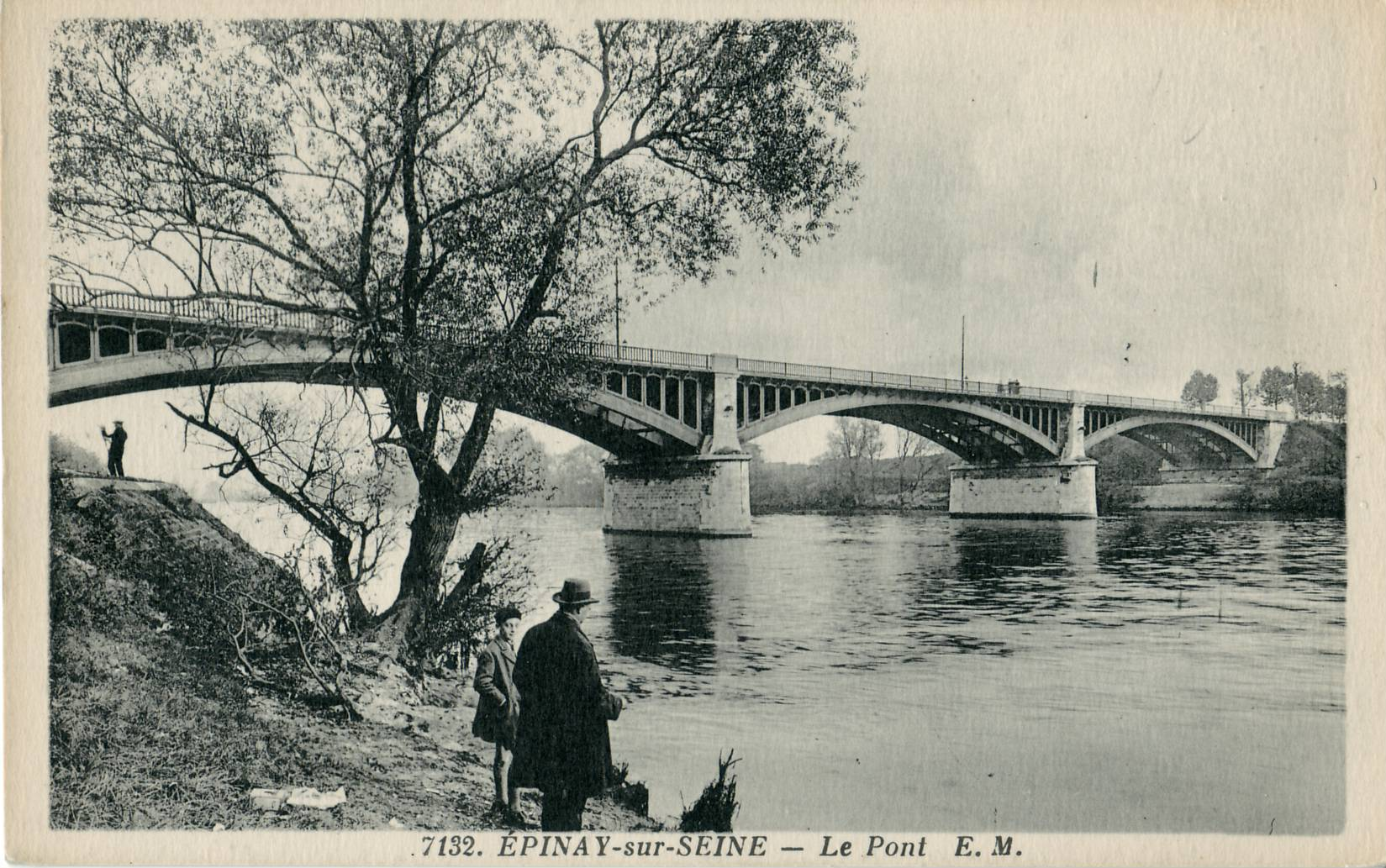 Carte postale ancienne éditée par EM, n°7135 :Épinay-sur-Seine - Le Pont